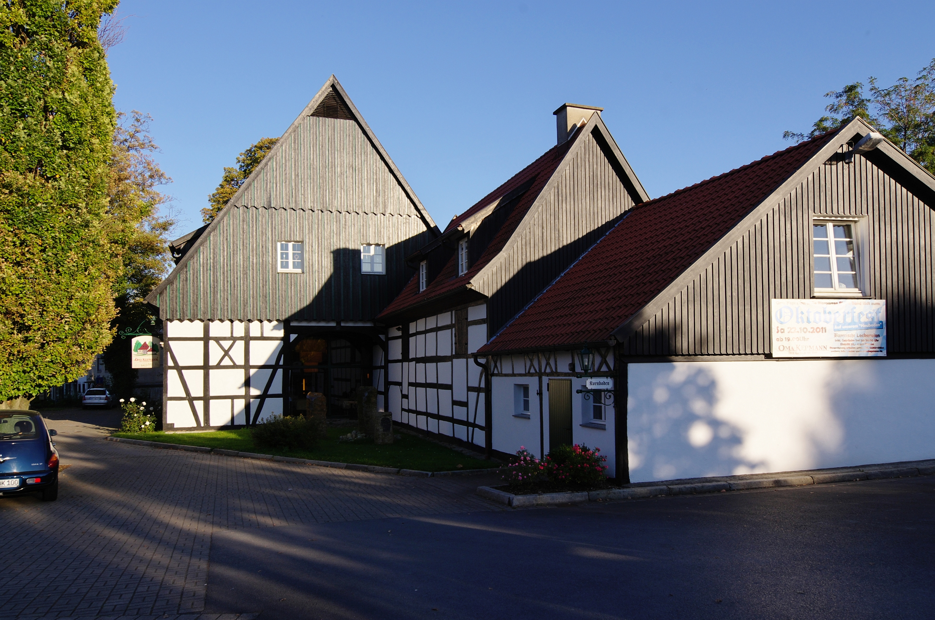 Baudenkmal in Unna, Eintrag A074